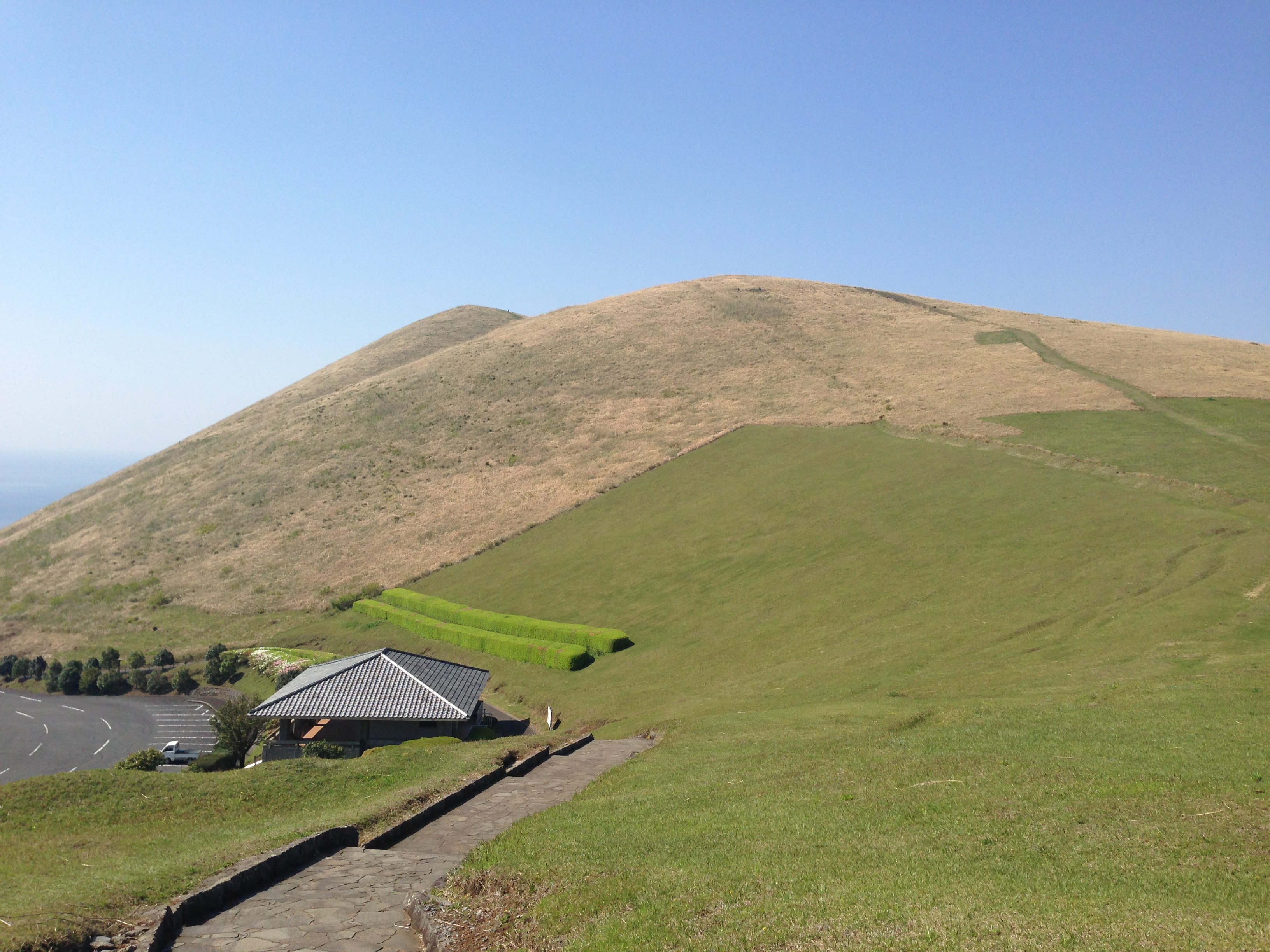 長崎県五島市（五島列島福江島）-鬼岳